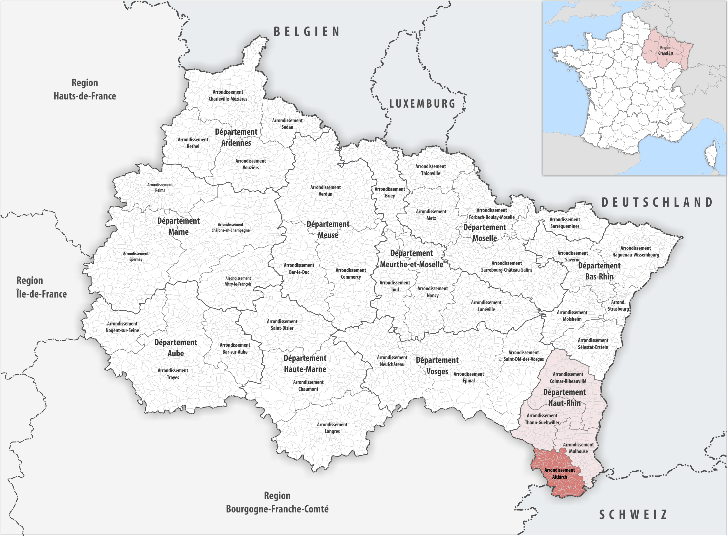 Lage des Arrondissements Altkirch